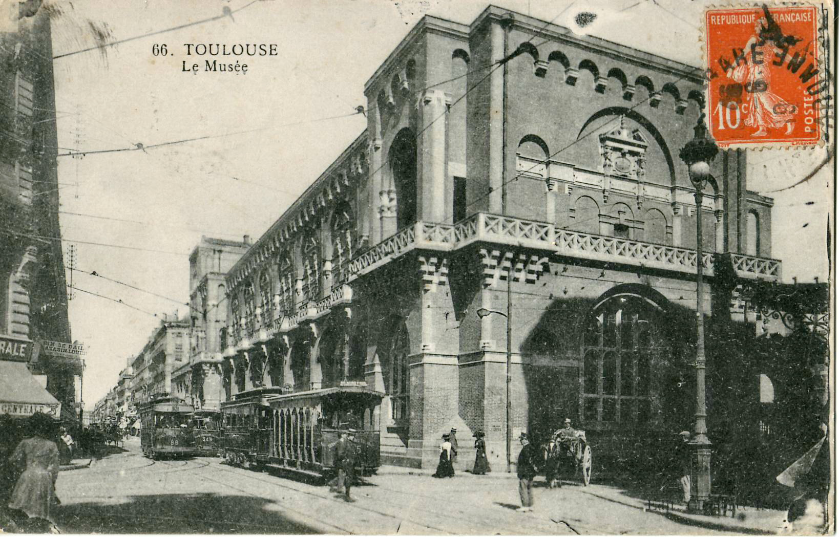 Carte postale ancienne éditée par Clément Frères, n°66 : TOULOUSE - Le Musée